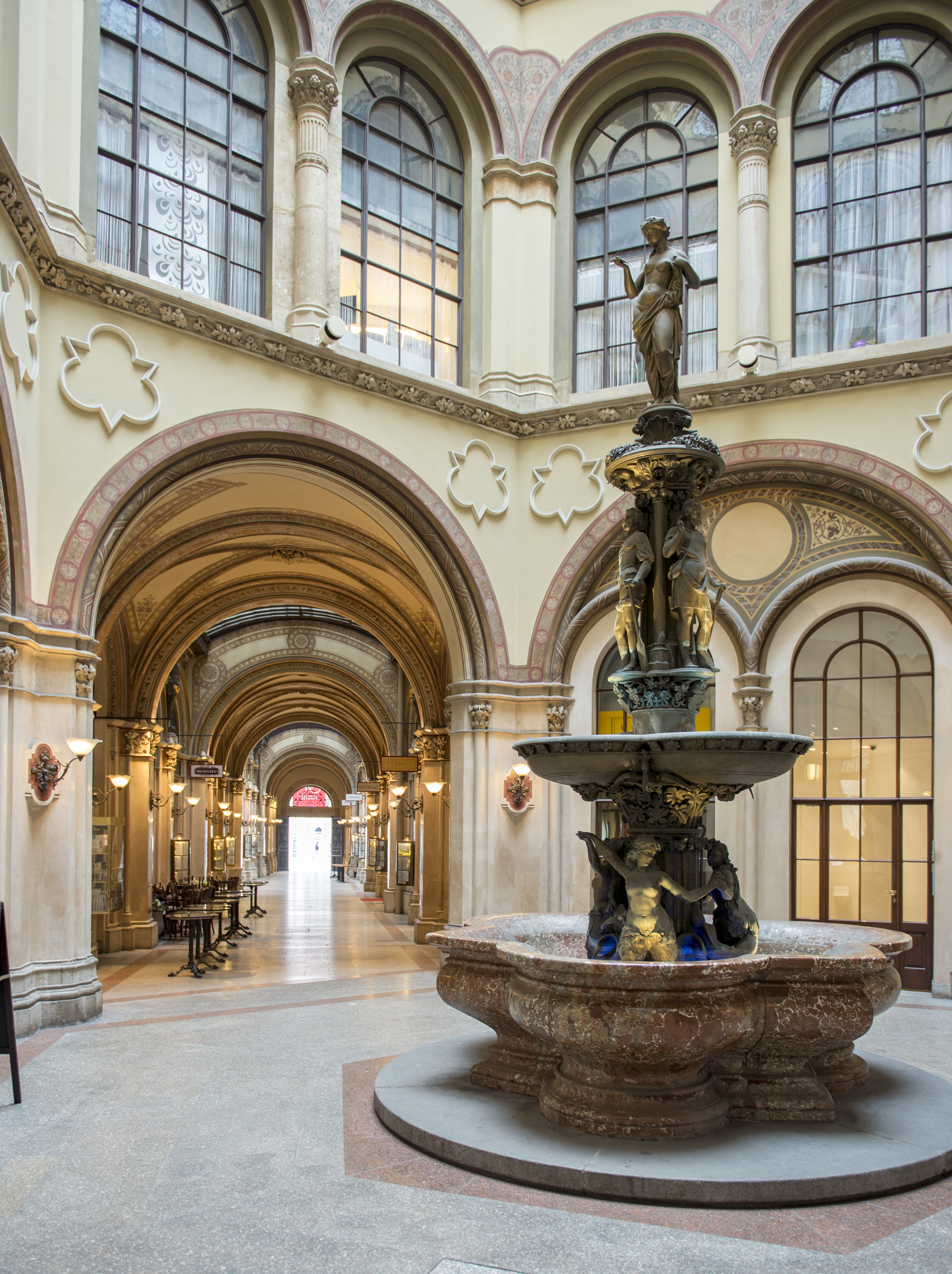 Palais Ferstel Brunnen und Durchgang